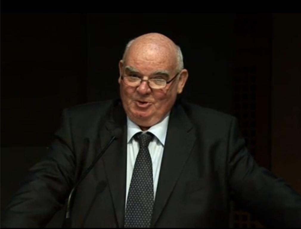 Conférence du 08/11/2012 au Musée du Louvre